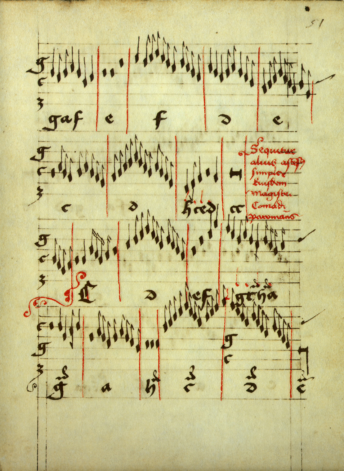 Lochamer Liederbuch, Berlin, Staatsbibl., Ms. Mus. 40613, Bl. 51r